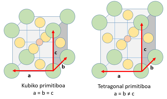 KNiF3 perovskita kubiko primitiboa eta KCuF3 perovskita tetragonal primitiboa.